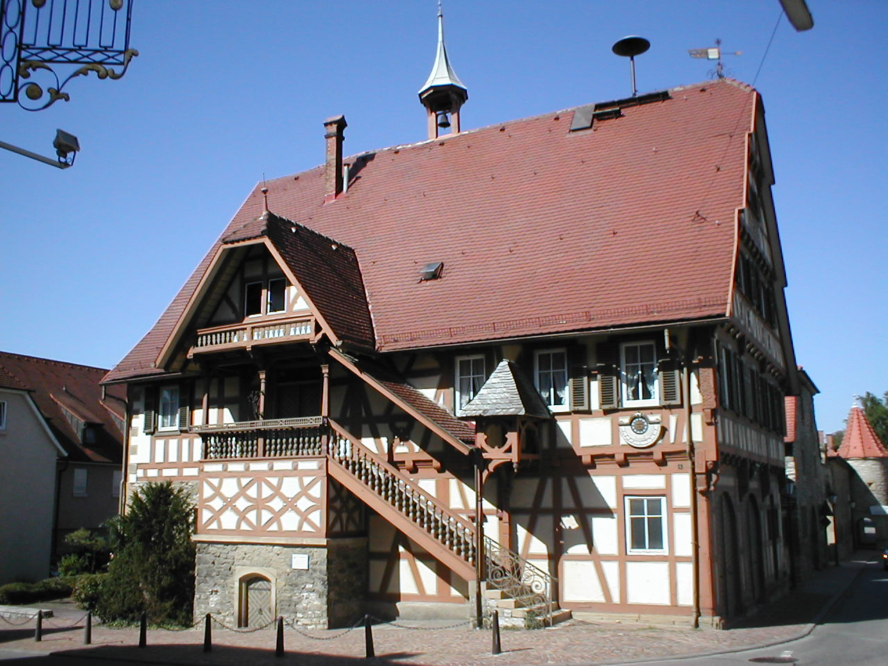 Altes rathaus von 1597 in Bad Friedrichshall-Kochendorf